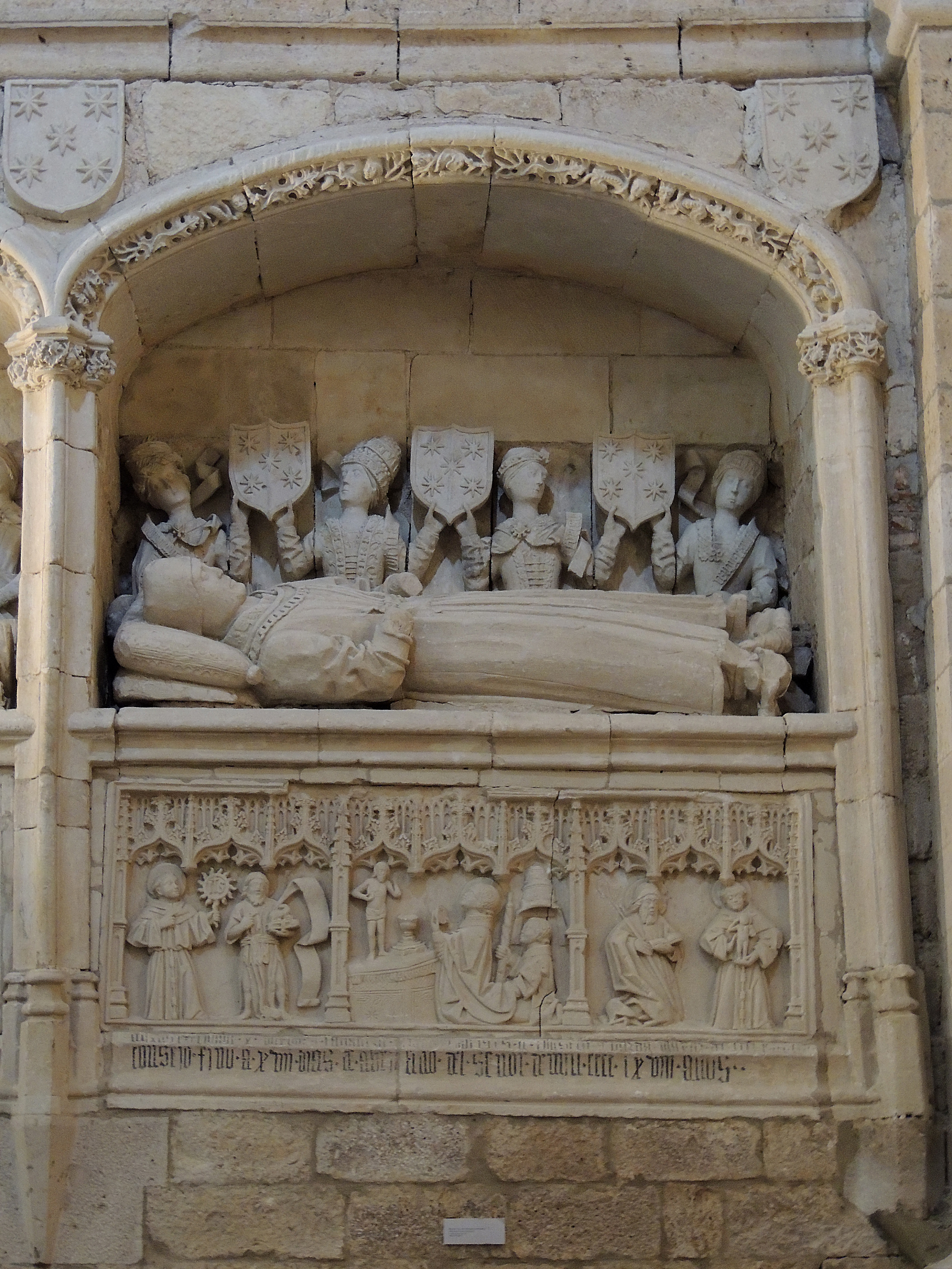 Sepulcro de Juan Rodríguez de Fonseca en la colegiata de Toro